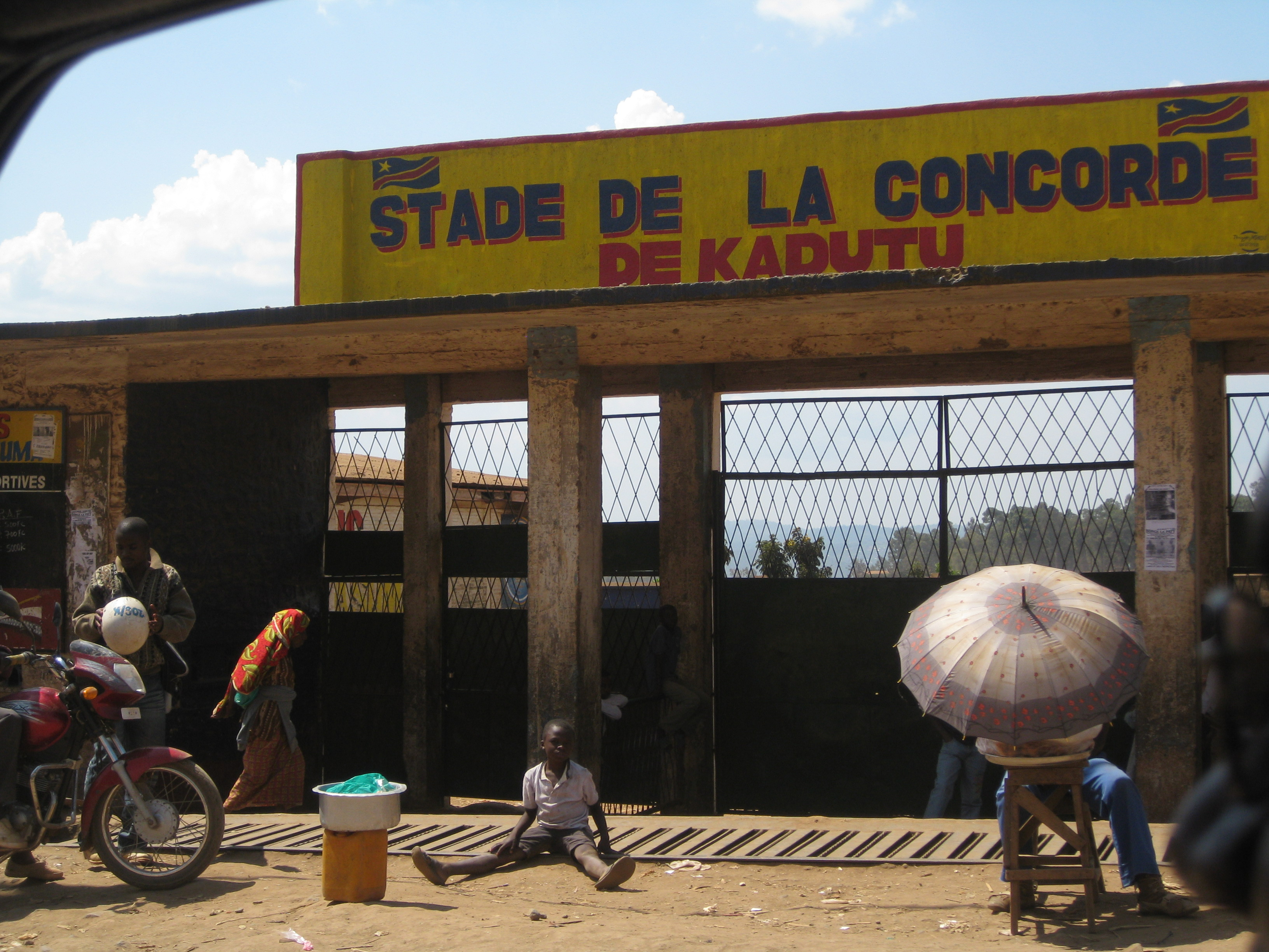 Stade de la Concorde (Kadutu) à Bukavu, en 2009